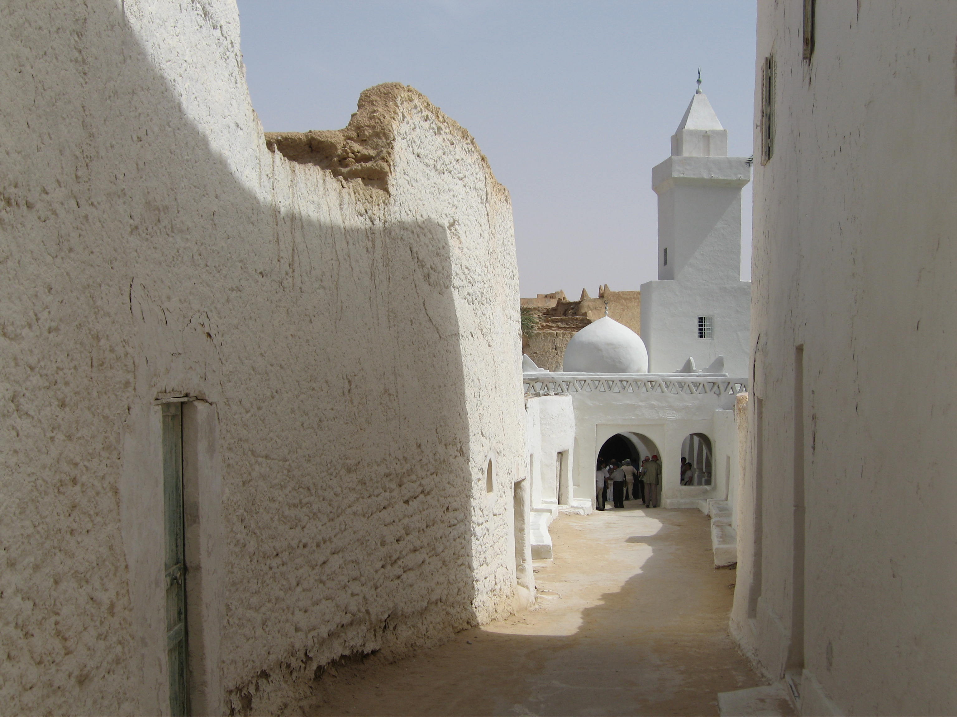 Ciudad vieja de Ghadames, con la mezquita al fondo.